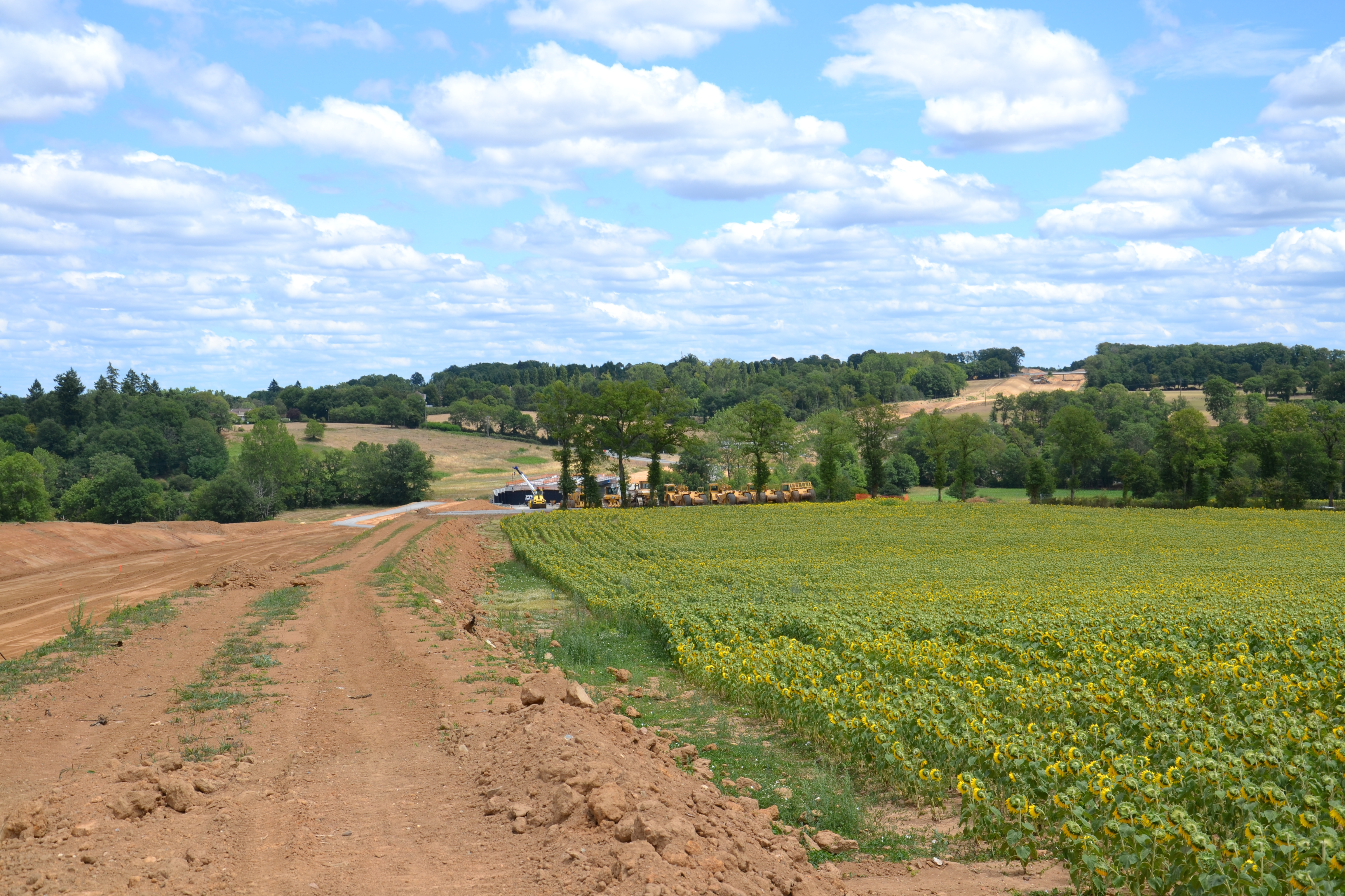 Chantier de la RN 141 au niveau de Grenord, en juillet 2011 (Charente, France)